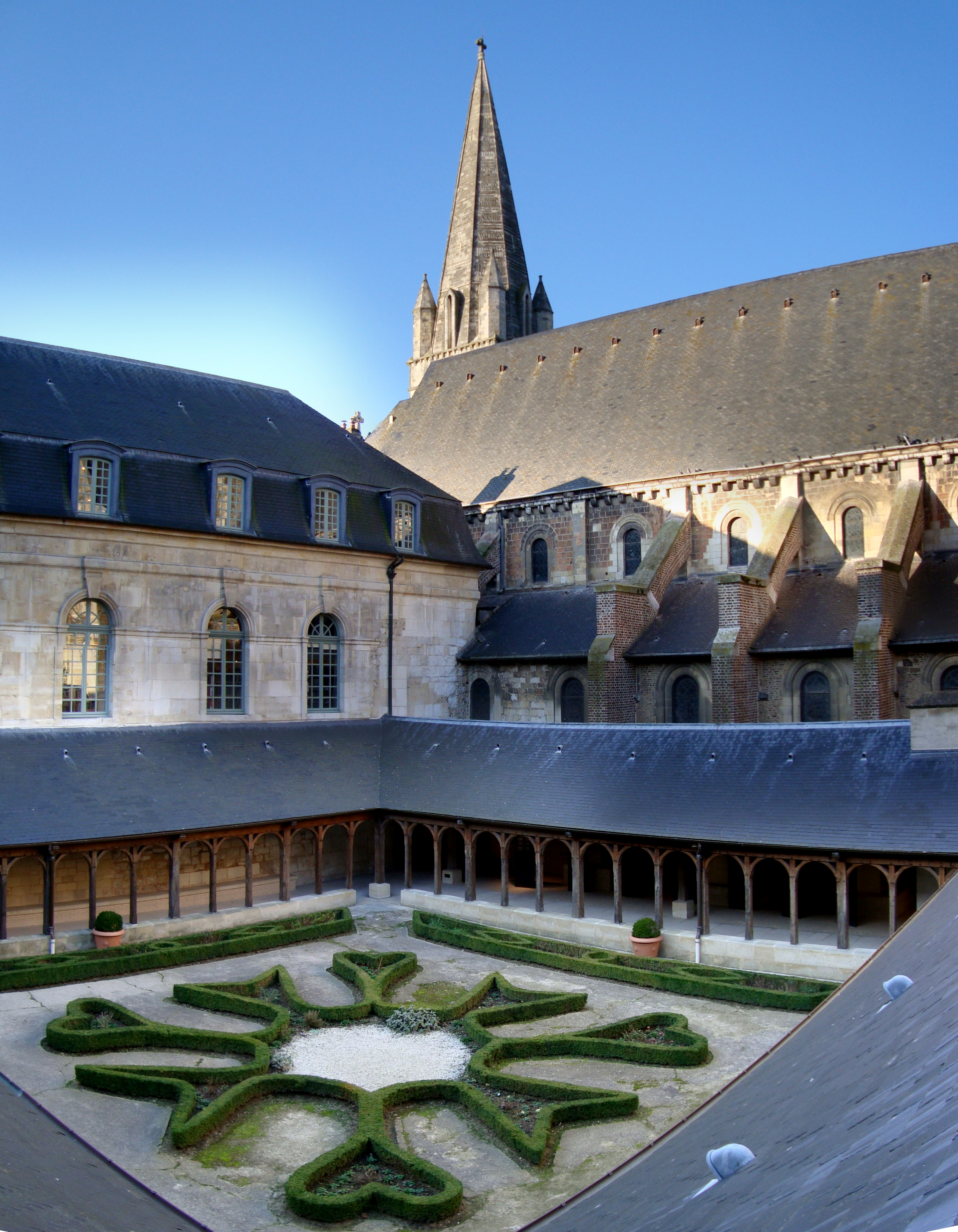 Le cloître de l'abbaye de Montivilliers (Seine-Maritime).